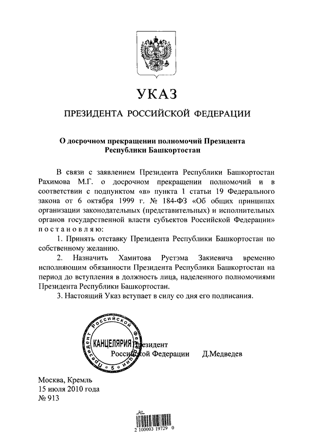 Указ Президента РФ от 15.07.2010 N 913 "О досрочном прекращении полномочий Президента Республики Башкортостан"